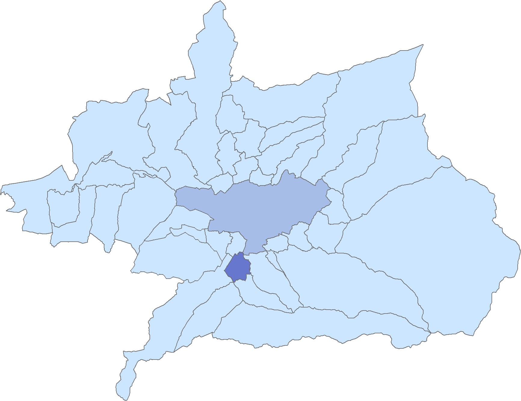 Situación del municipio de Ogíjares respecto a la comarca de la Vega de Granada, en España.